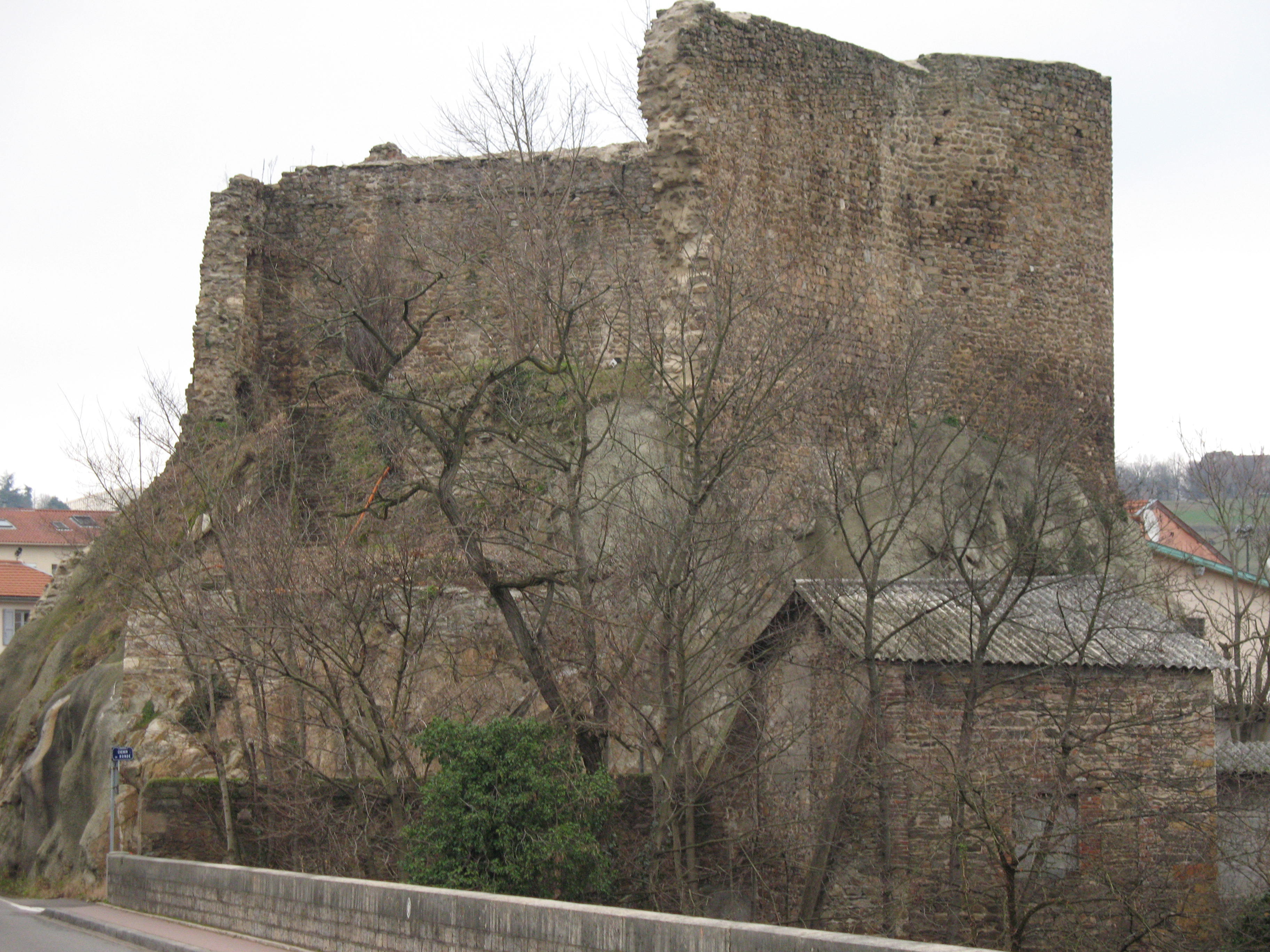 Château de Francheville dans le Rhône